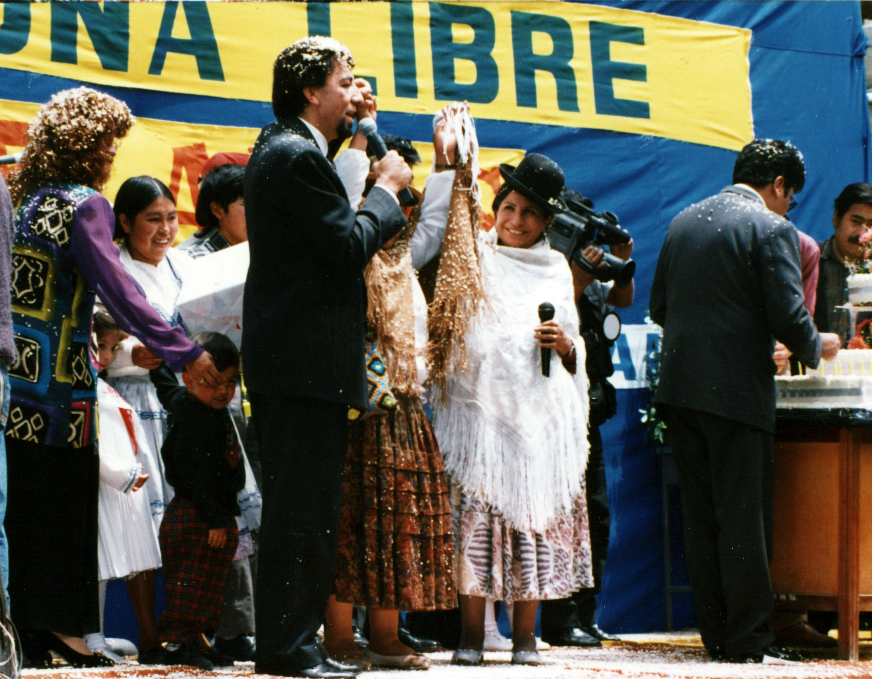 Remedios y Carlos